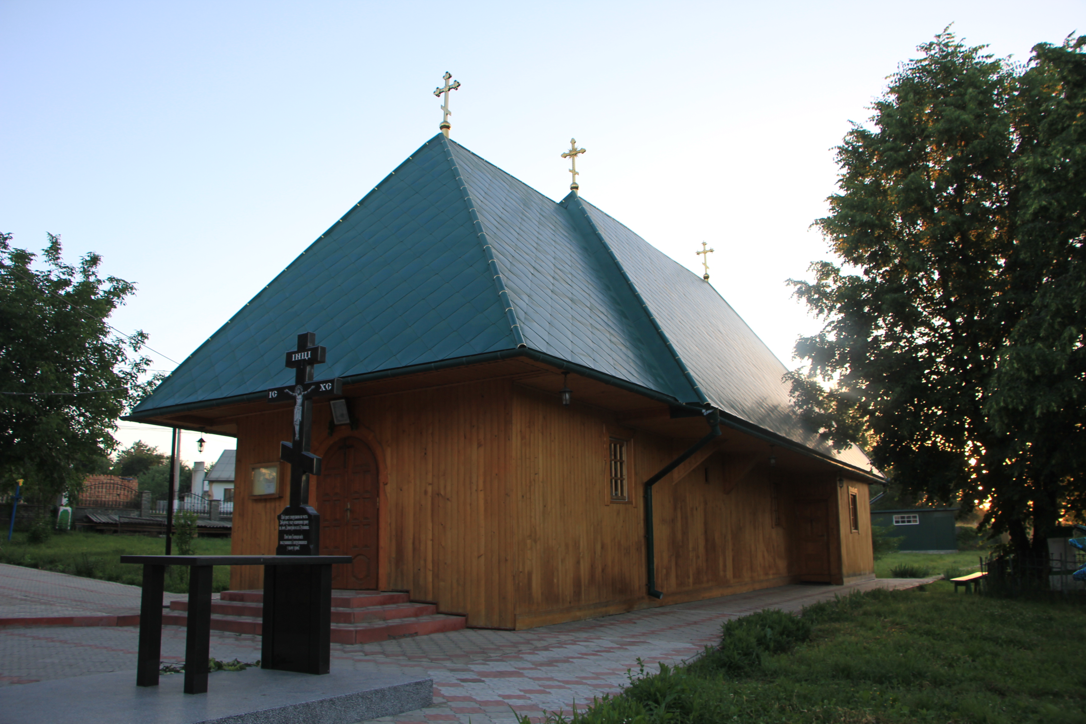 Дерев'яна церква Св. Дмитра 1757 с. Луковиця